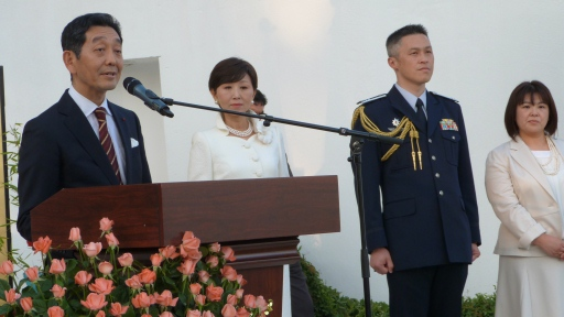 藤原聖也駐アルジェリア日本大使はスピーチを行い、冒頭、平成27年１月に新たに着任した小林防衛駐在官を紹介するとともに、日本の防衛省自衛隊の実績とアルジェリアとの防衛分野における関係を展望する上で重要と思われる点を、下記のとおり言及しました。